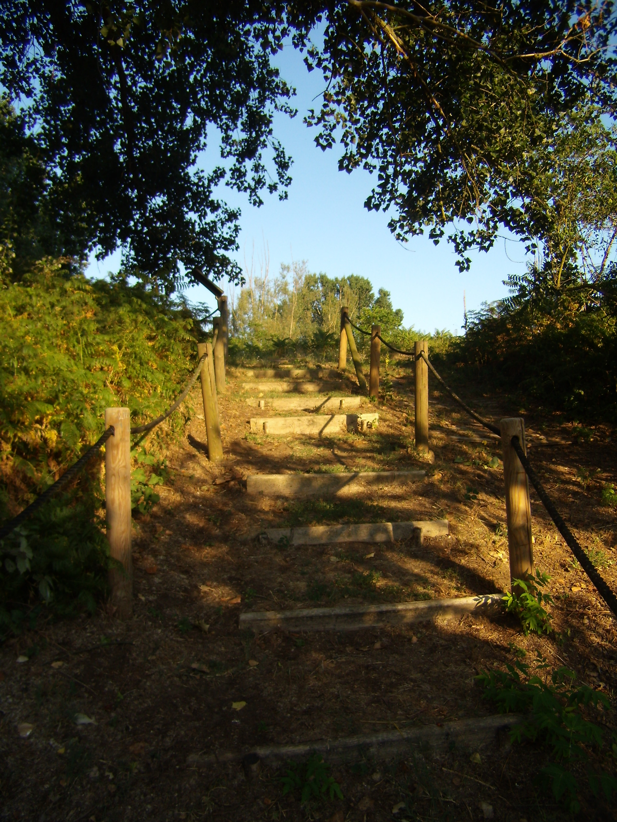 Dune fossili di Massenzatica This is a photo of a monument which is part of cultural heritage of Italy. The authorisation for taking photos of this object was provided by the World Wide Fund for Nature Italy.